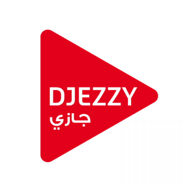 شعار شركة جازي منذ 2015